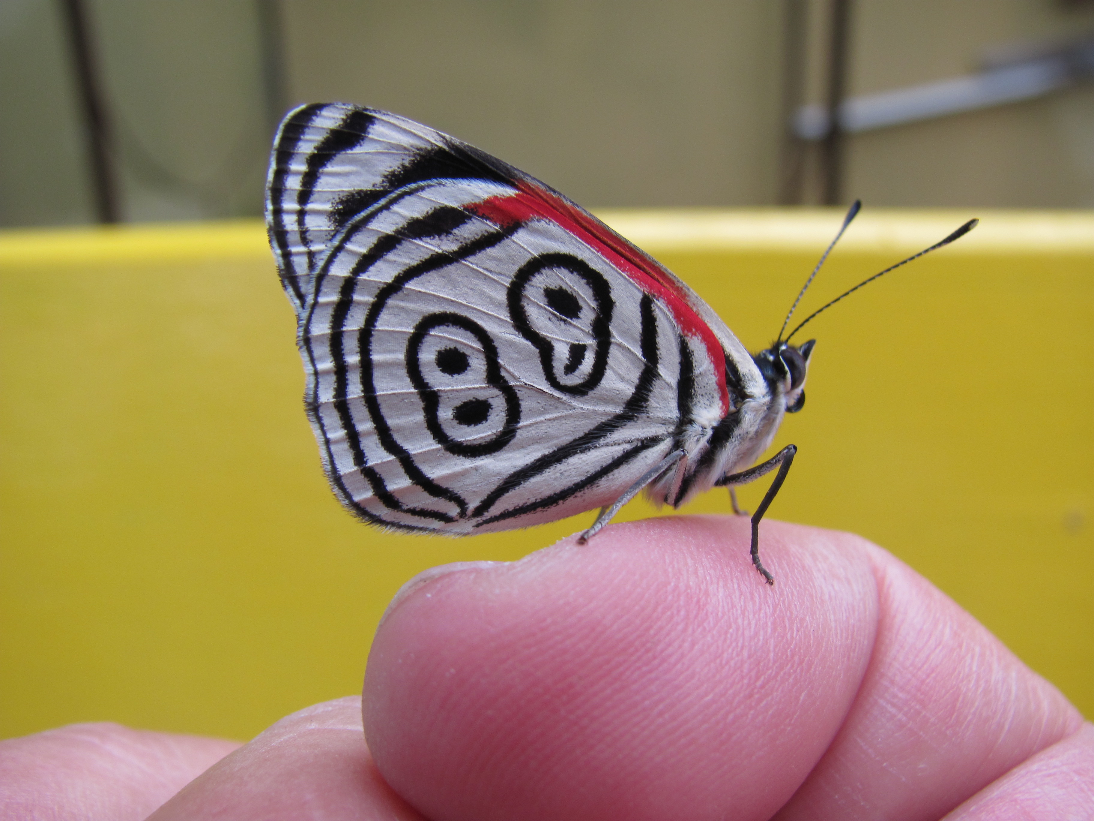 Diaethria eluina em Viamão